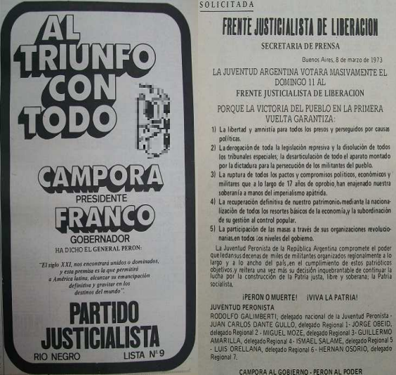 Publicidad del Frente Justicialista de Liberación (FREJULI), en la provincia de Río Negro, elecciones de marzo de 1973, publicada en el Diario Río Negro, 10 de marzo de 1973.